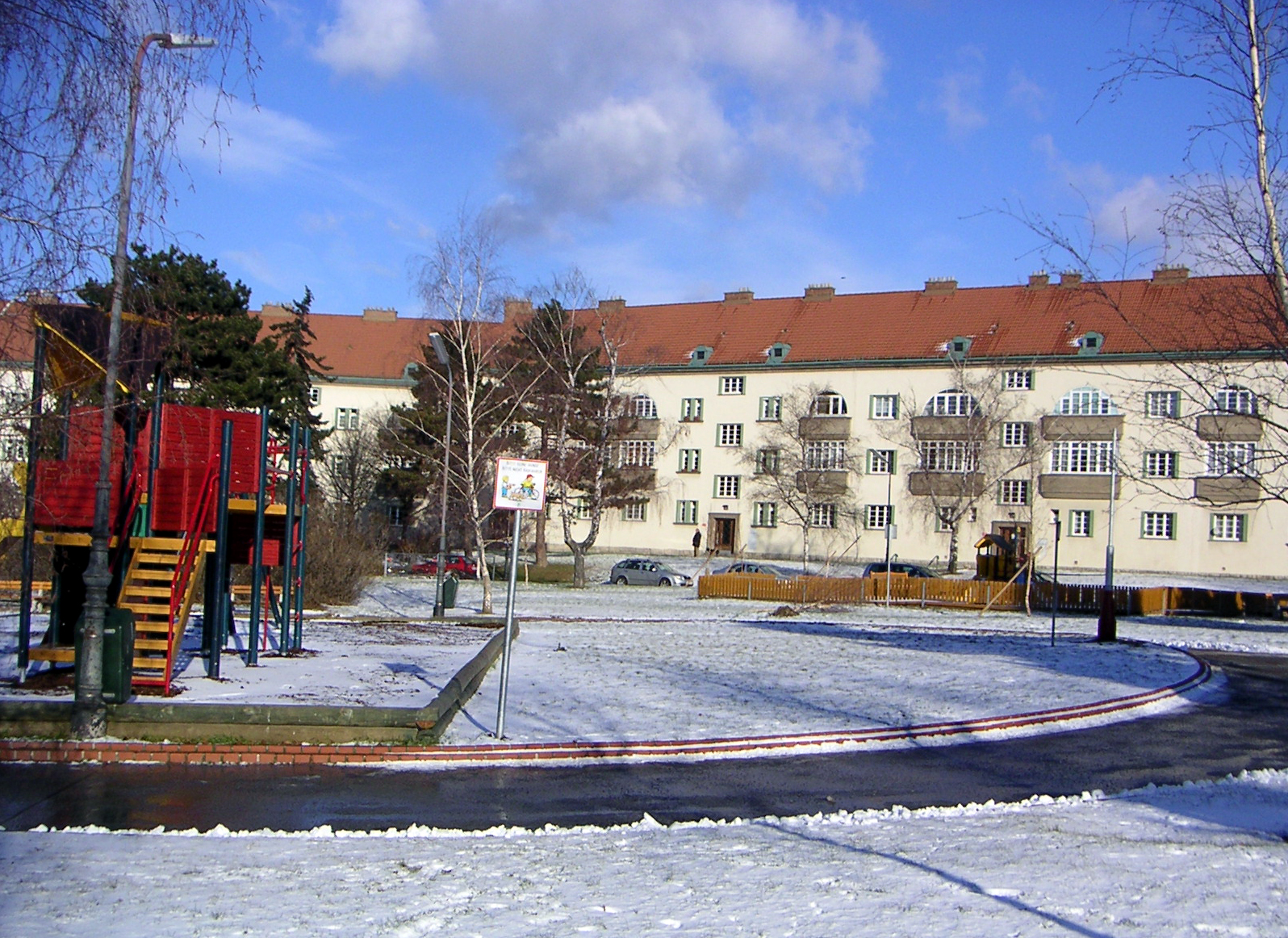 George Washington-Hof in Wien, innen, selbst fotografiert